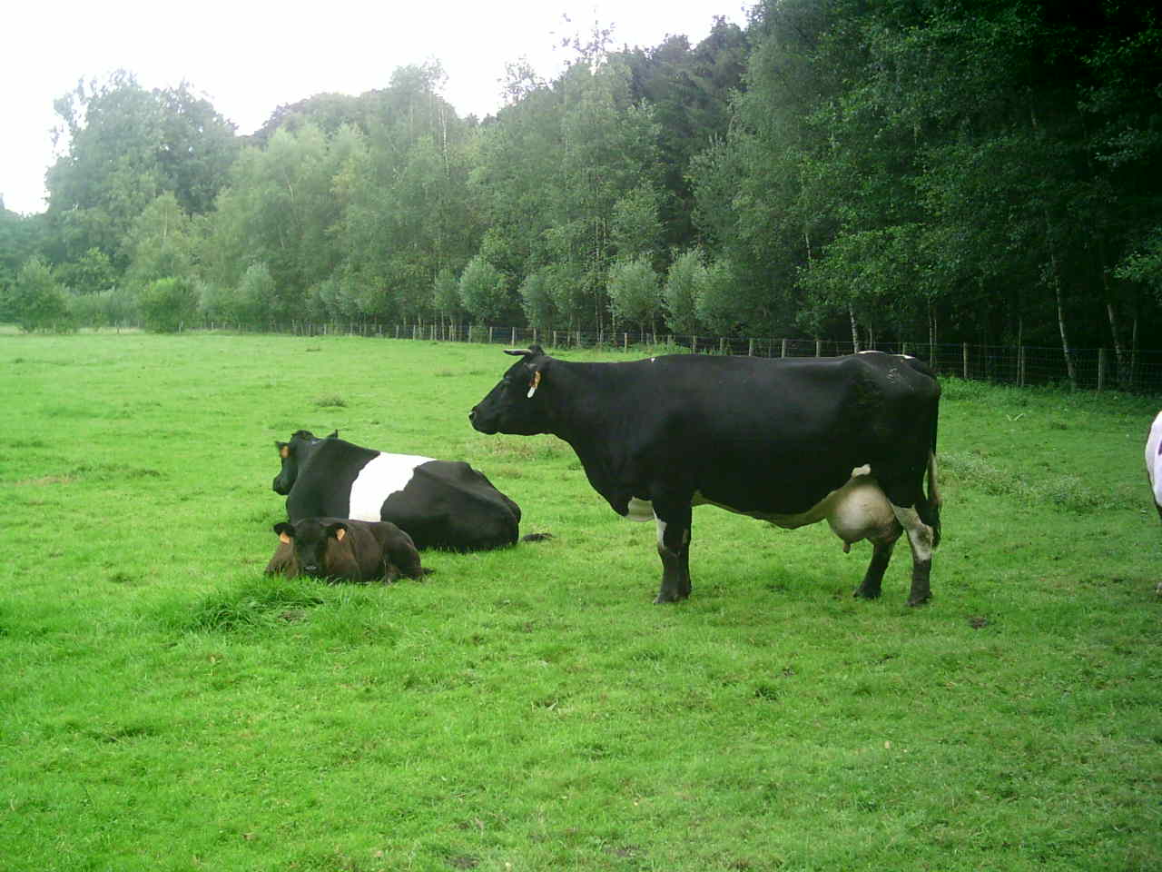 Cows